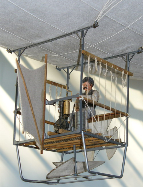 Stuttgart-Bad Cannstatt Werkstatt Gottlieb Daimler: Modell Luftschiff 1888